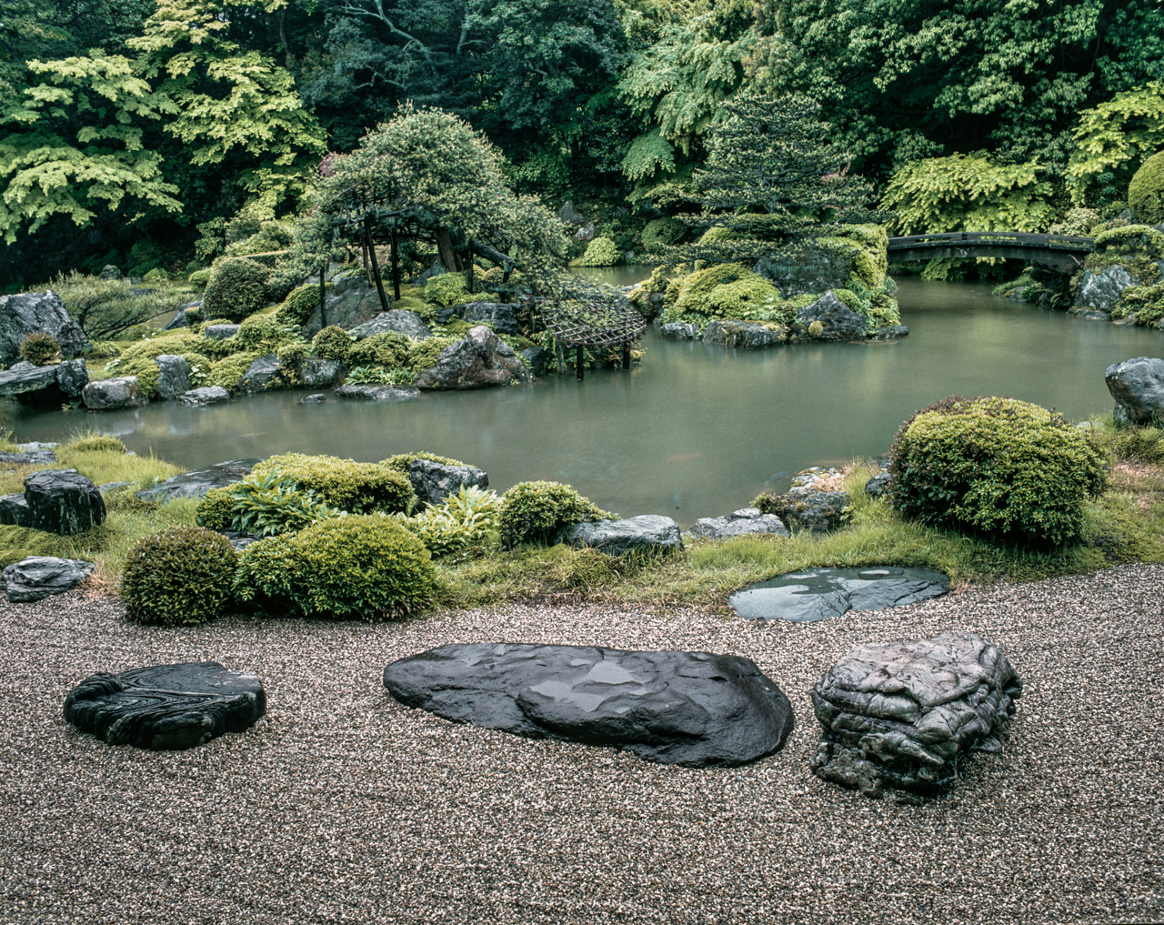 Japonské zahrady - Sambóin